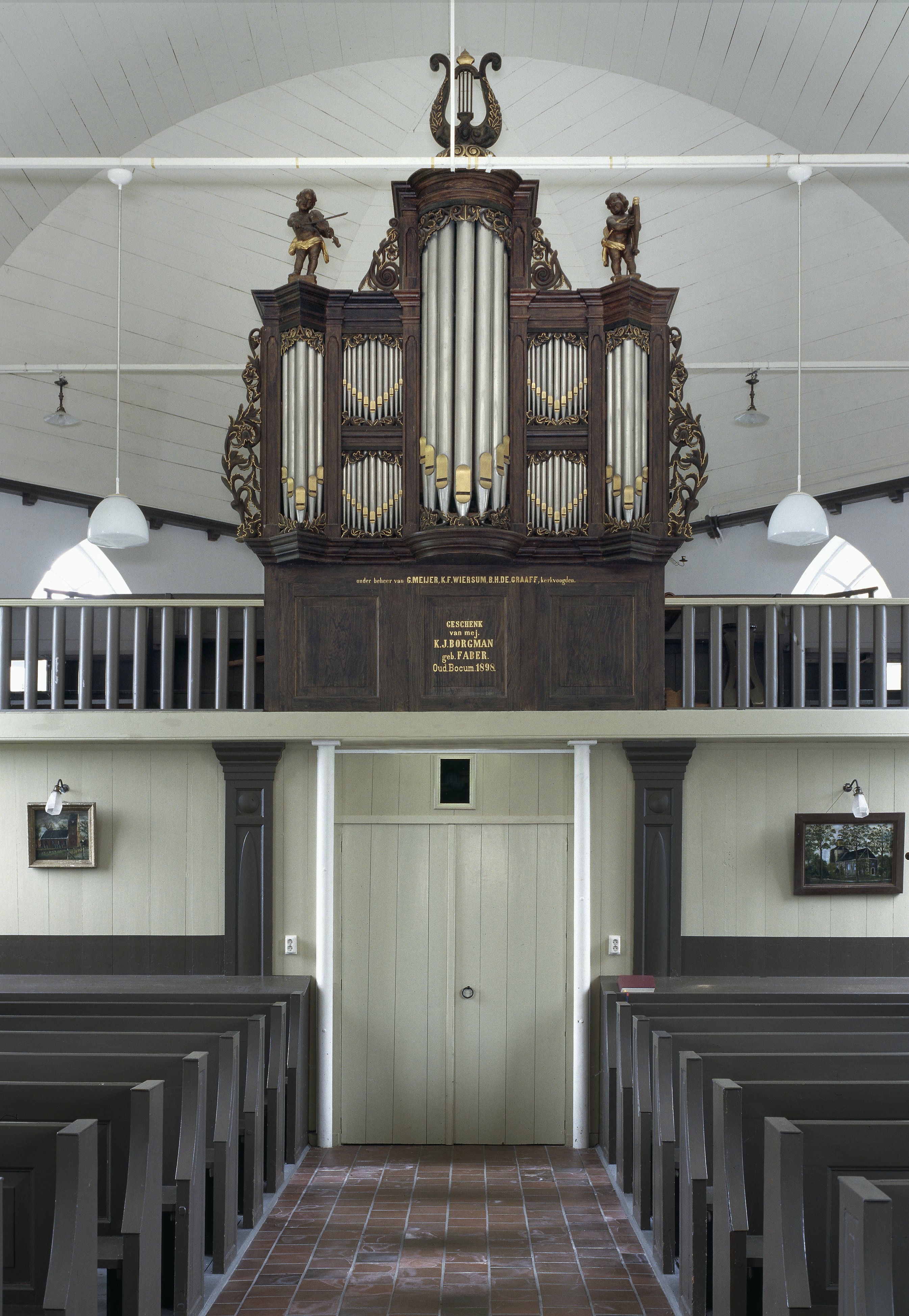 Nederlands Hervormde Kerk: Interieur, aanzicht orgel, orgelnummer 786 (opmerking: Gefotografeerd voor Het Historische Orgel in Nederland 1894-1901, bladzijde 213)